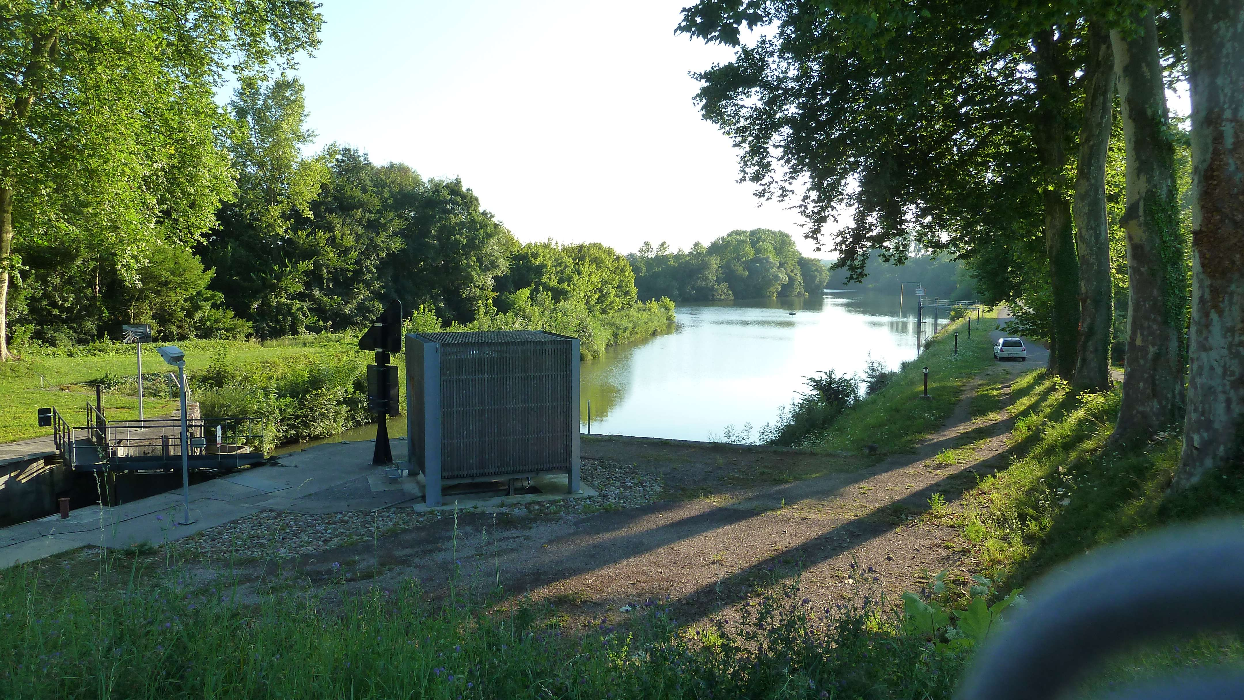 Ecluse du Tremblant à Maxilly sur Saône.